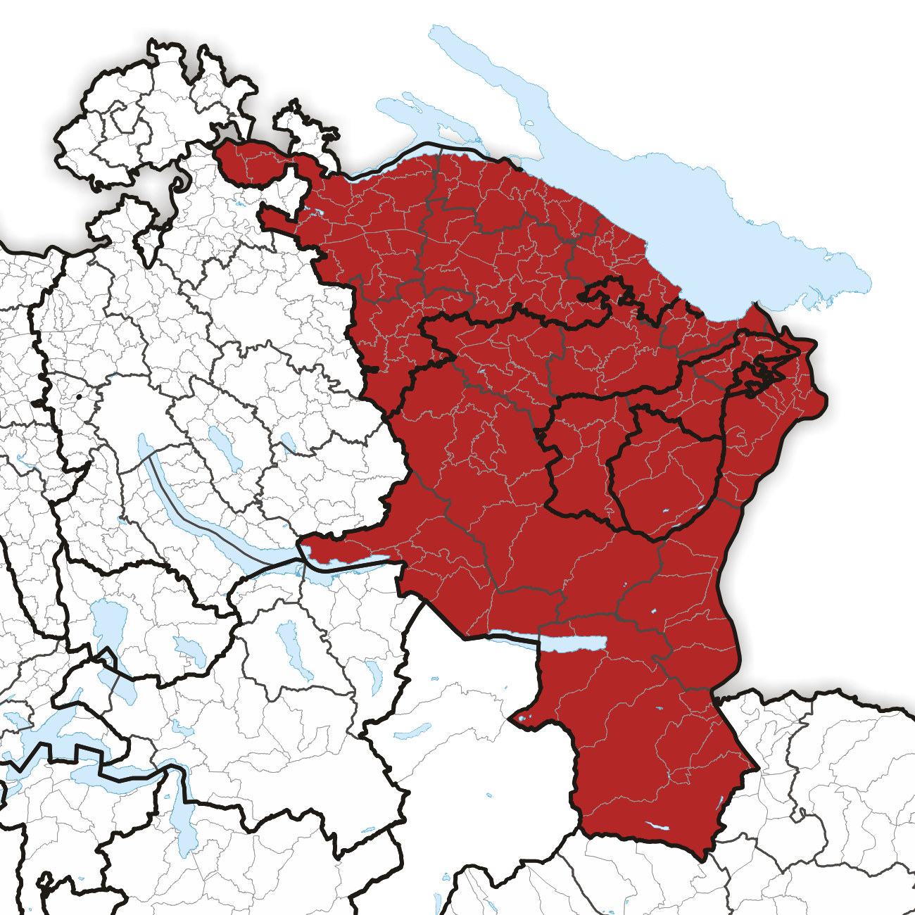 Ostschweiz (Kernregion)